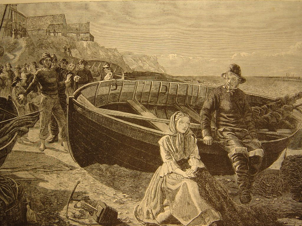 la fille de Katwijk